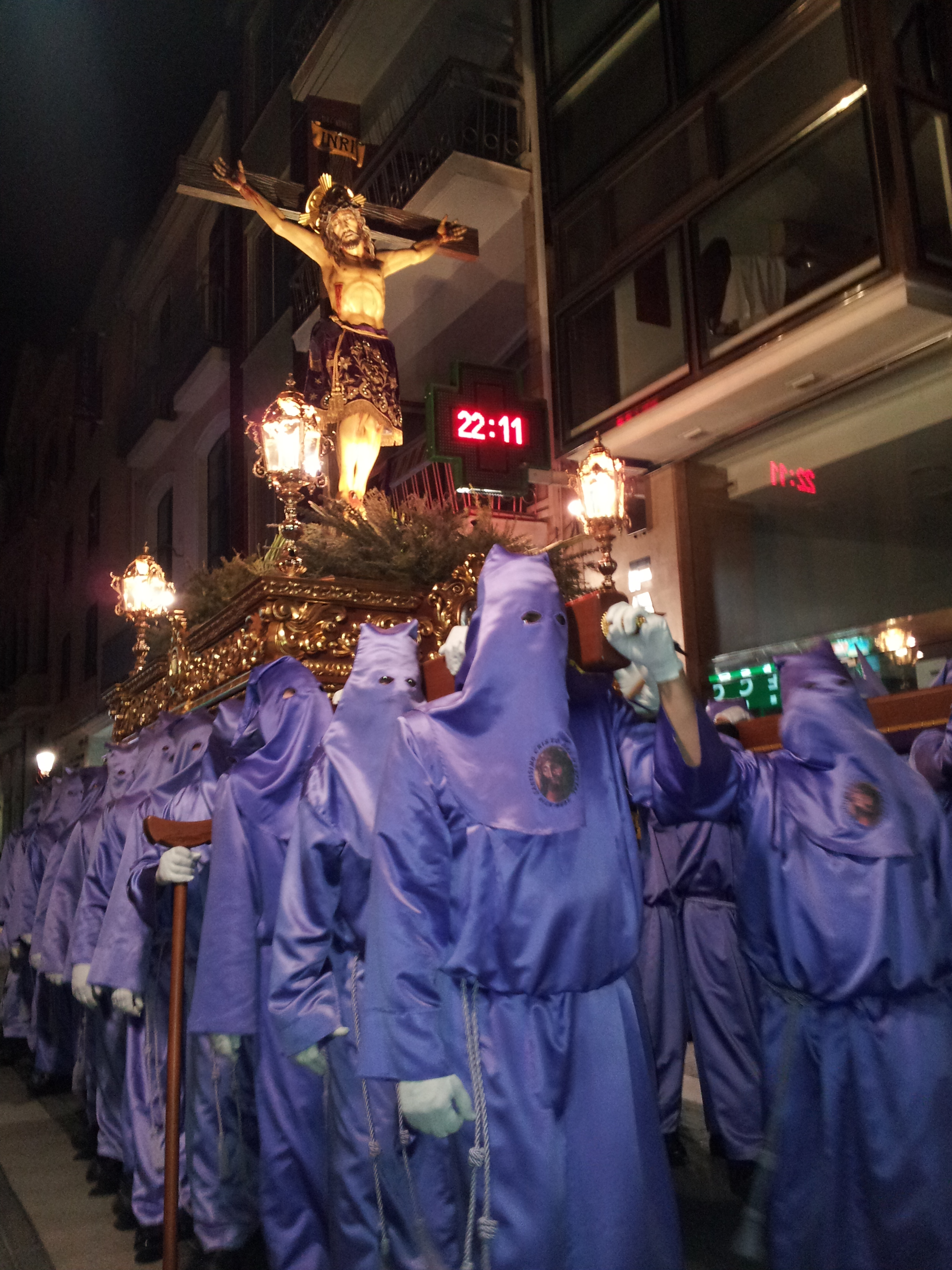 Procesión del Miércoles Santo de 2015 en Villarreal (España) This is a photography of a Folklore festival in Spain (Wikidata id Q23663127).